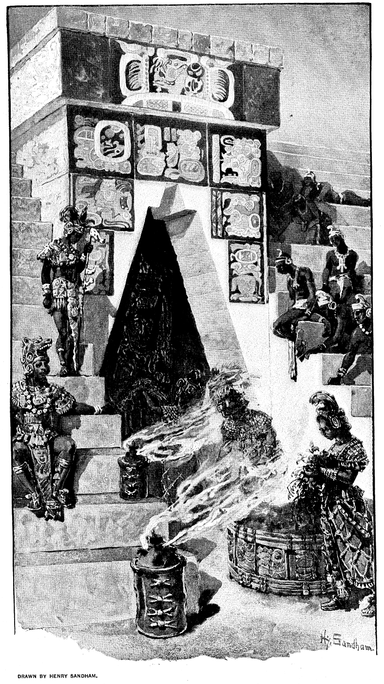 Stela I and altar